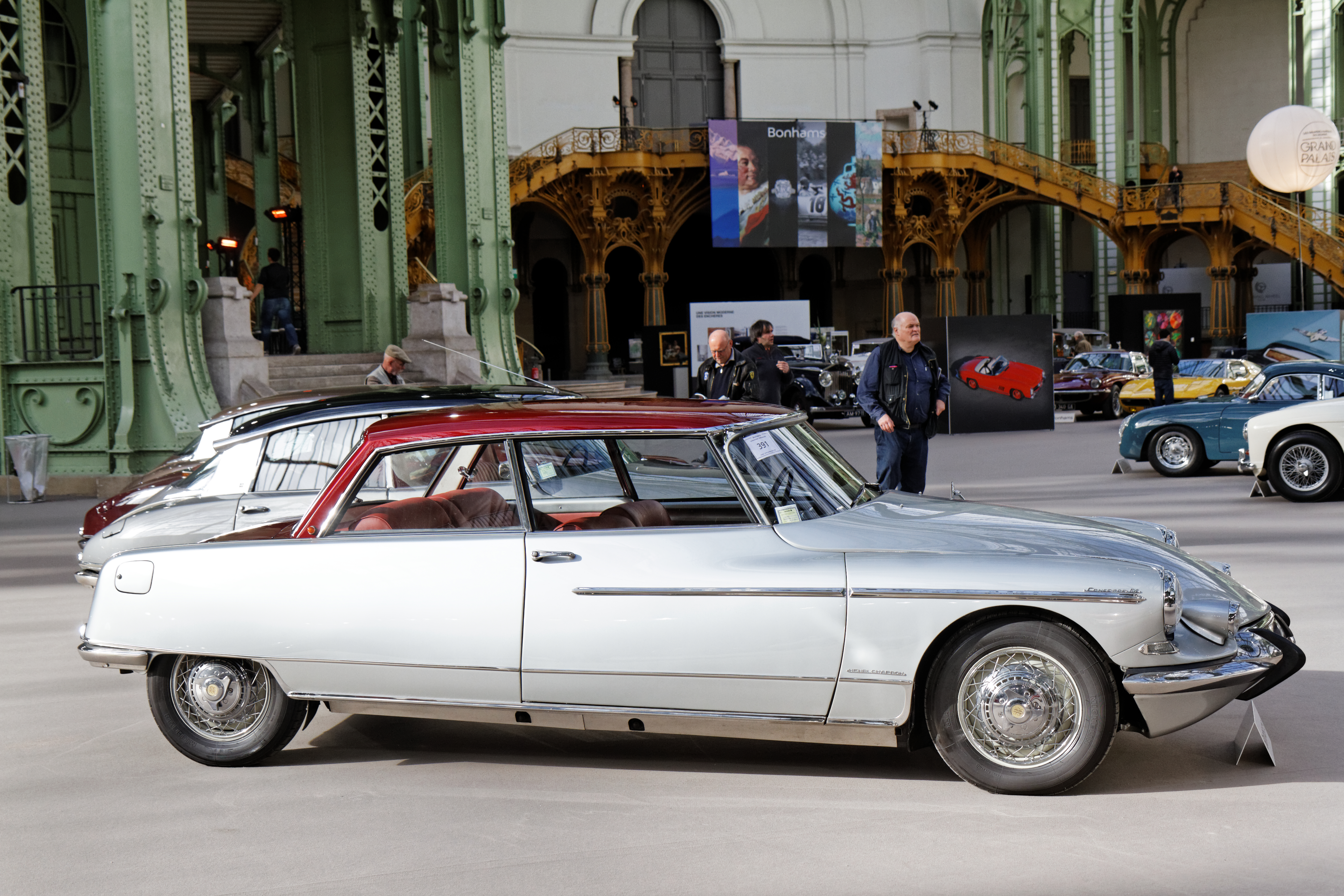 Une Citroën DS19 Concorde Coupé au Grand Palais lors de la vente Bonhams en février 2014.